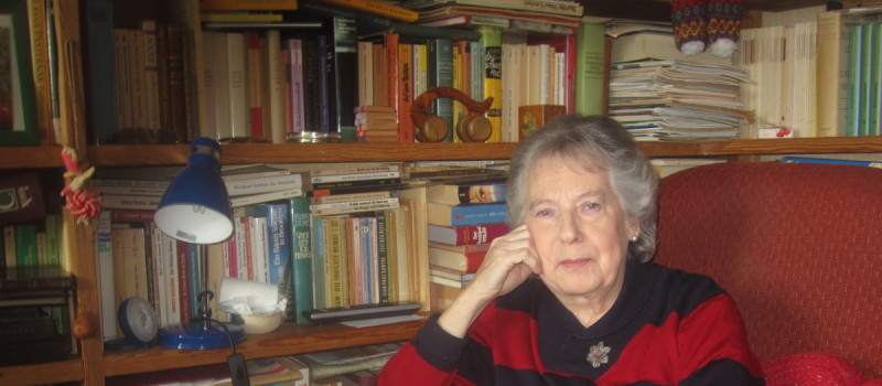 A escritora galega Úrsula Heinze.